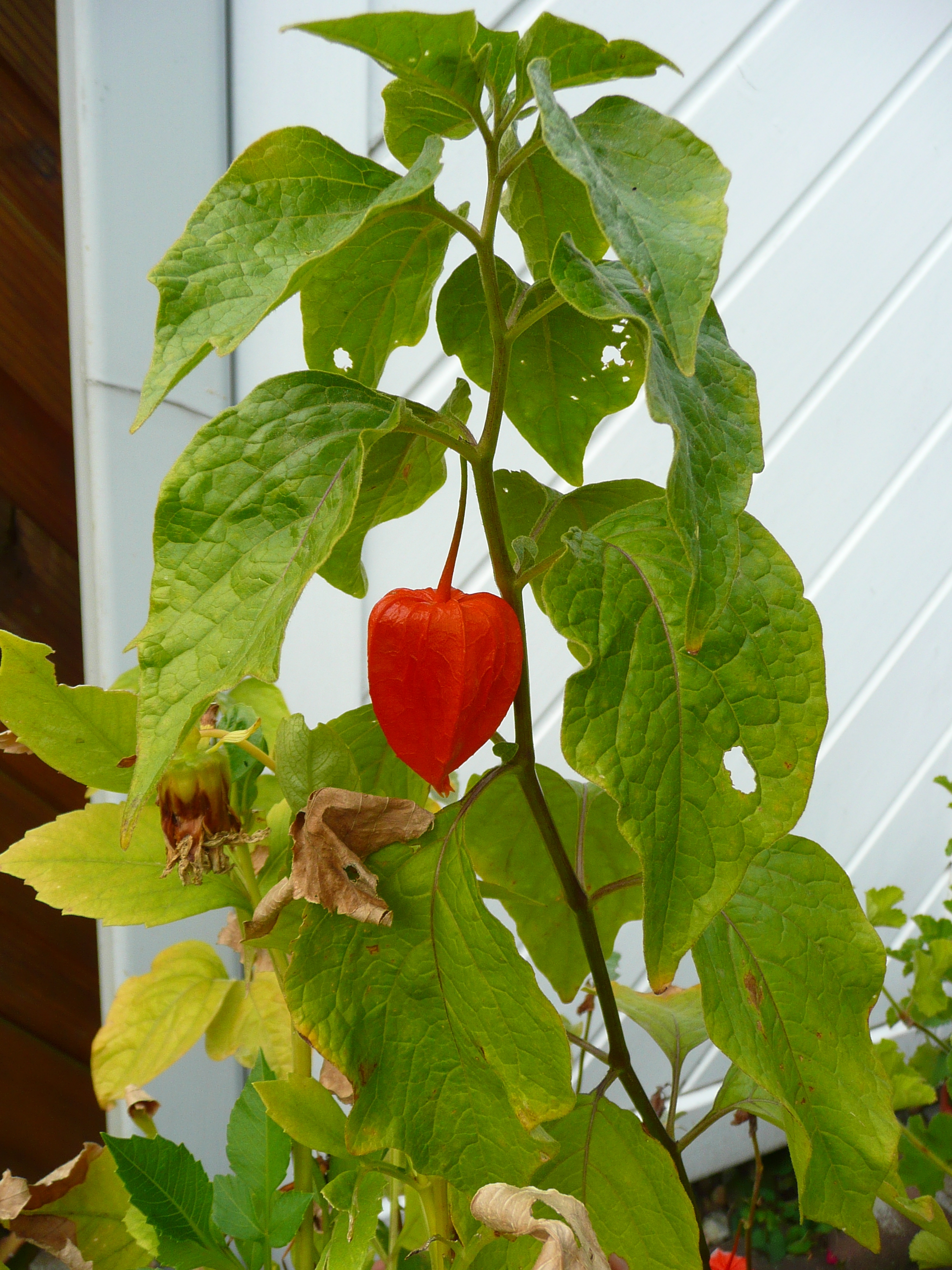 Lampionblume (Physalis alkekengi)